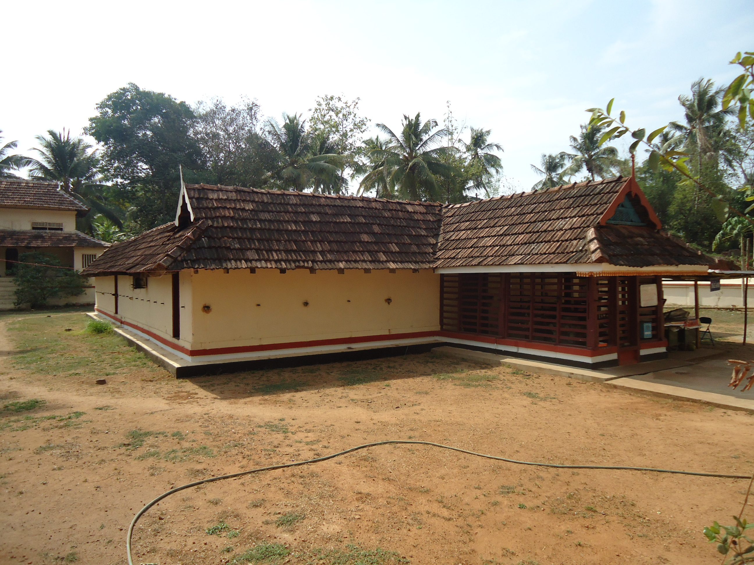 Kumarakulam Sree Subrahmanya Swami Temple Thuravoor Side View